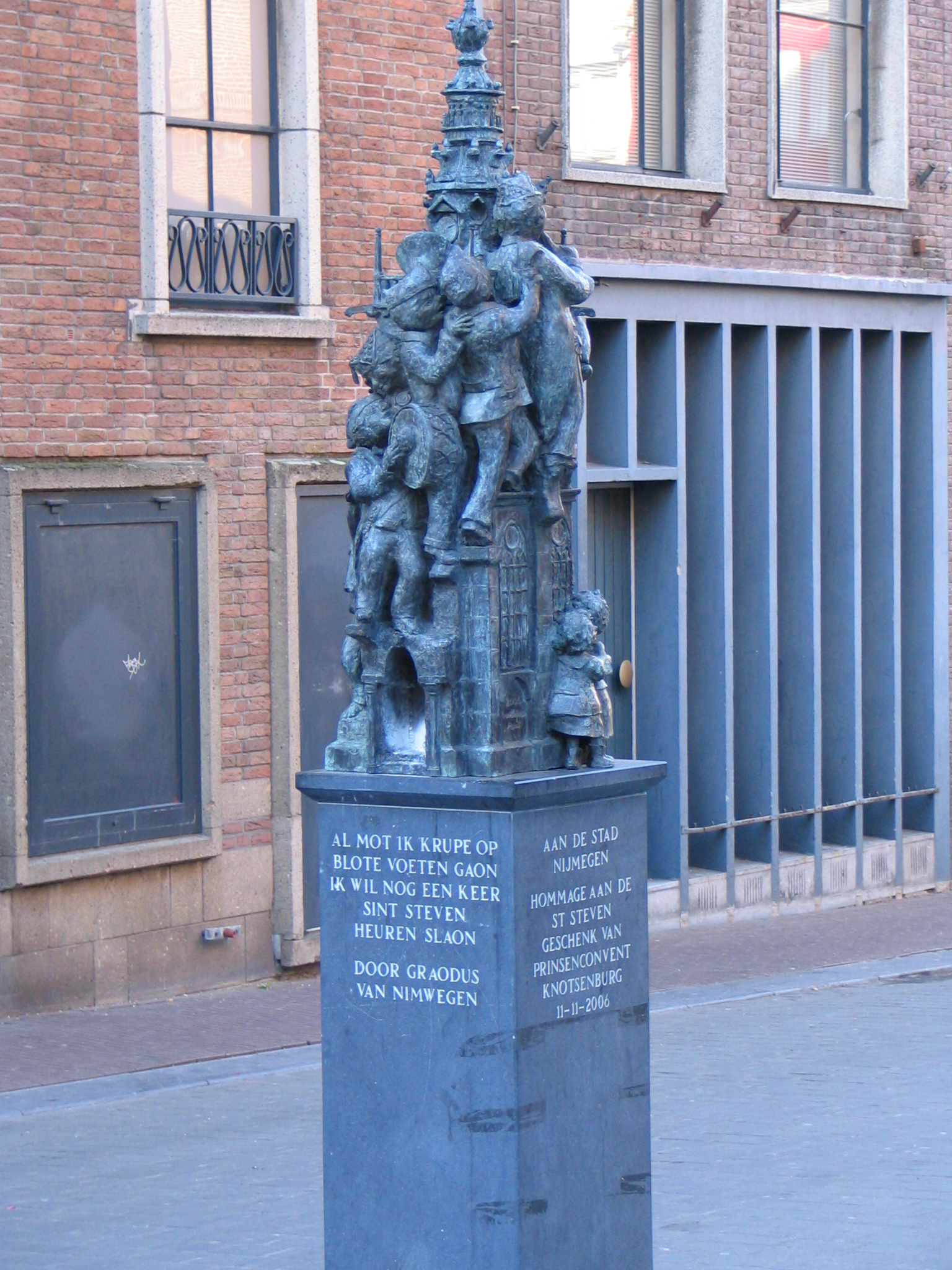 Hommage aan Graodus van Nimwegen, standbeeld staat in de Platenmakersstraat, zijstraat van de Burchtstraat, in Nijmegen.